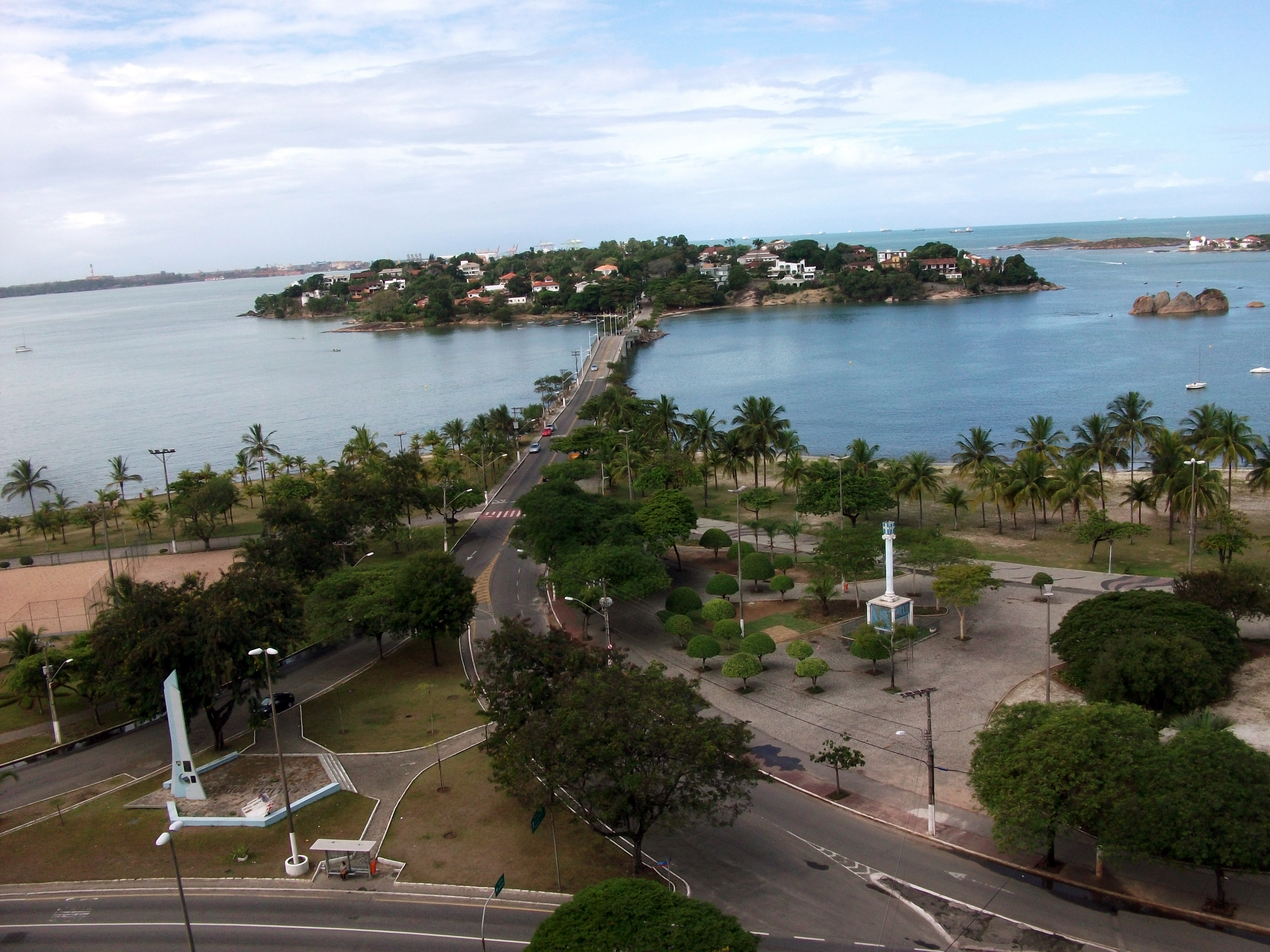 Ilha do Frade, Vitória - ES, Brazil